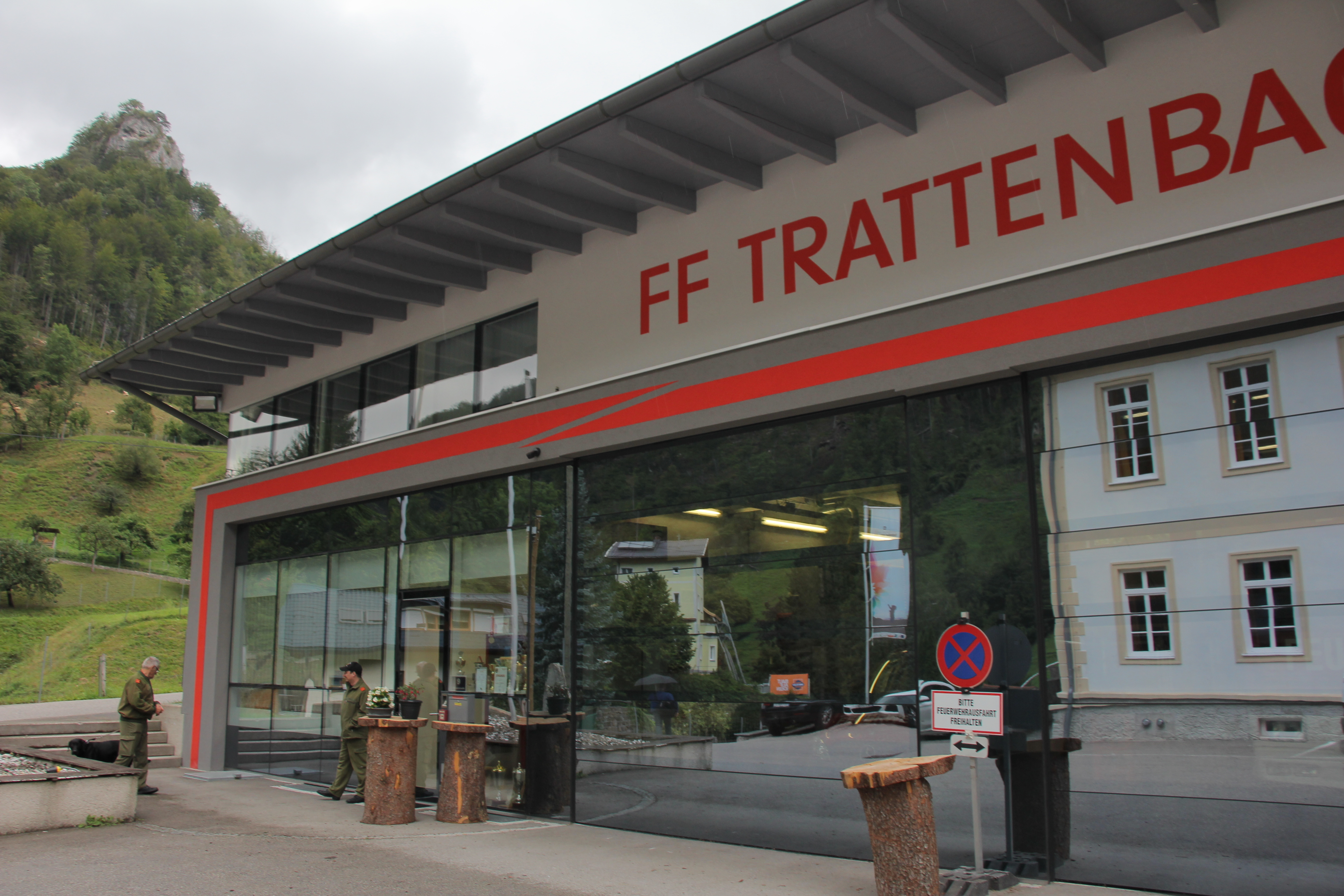 Besuch des Trattenbachtales im Rahmen der KulTour von WMAT